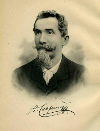 Foto Antonio Carpené